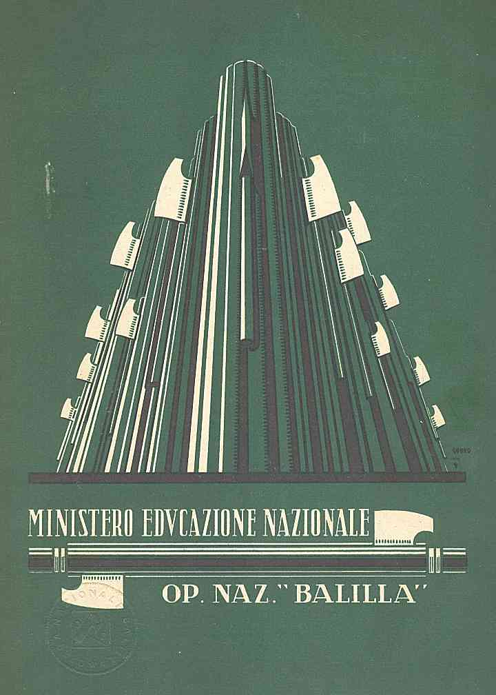 Opera Nazionale Balilla Ministero Educazione Nazionale - copertina di pagella di 1a elementare